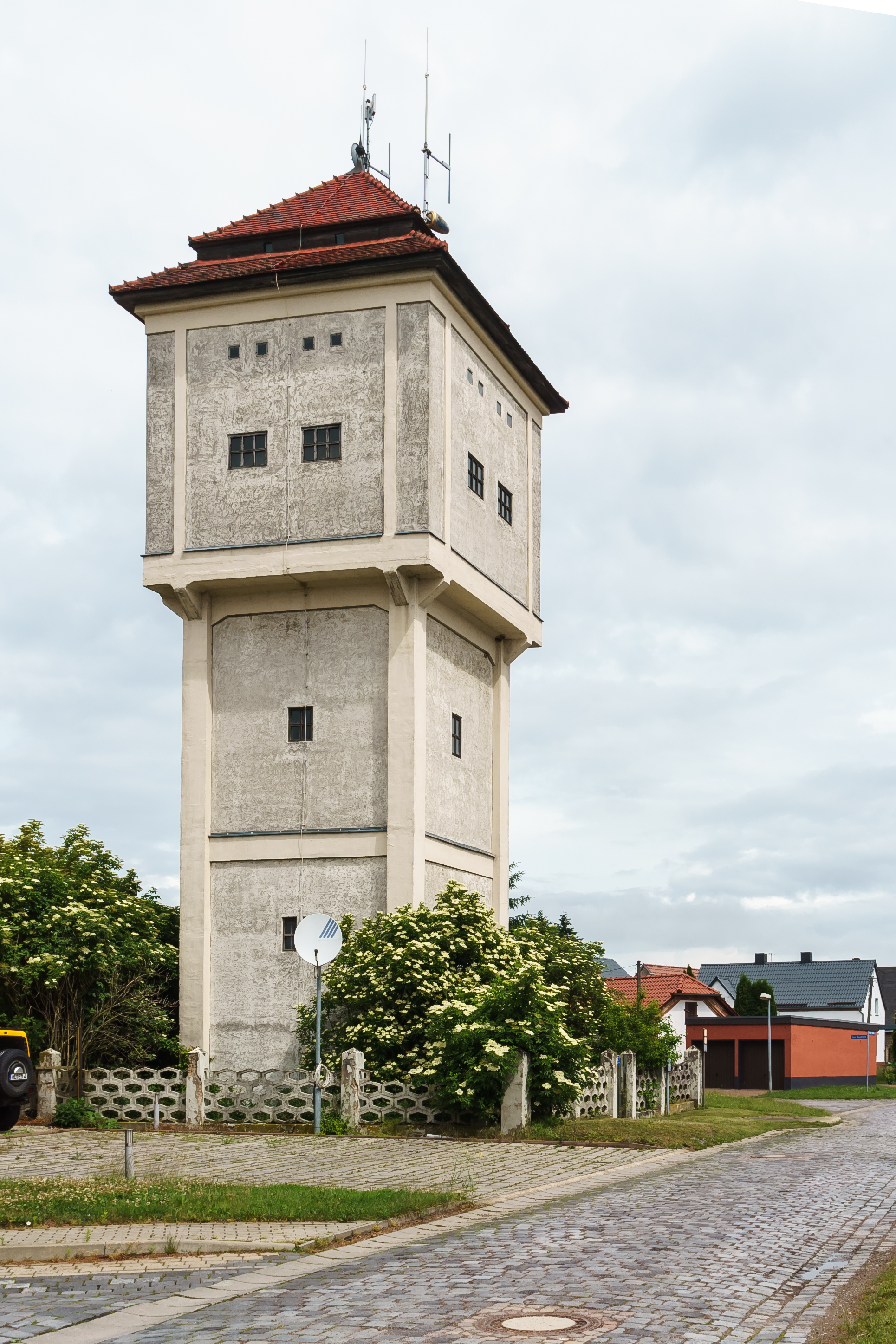 Wasserturm, Straße der Einheit in Lutherstadt Eisleben OT Bischofrode